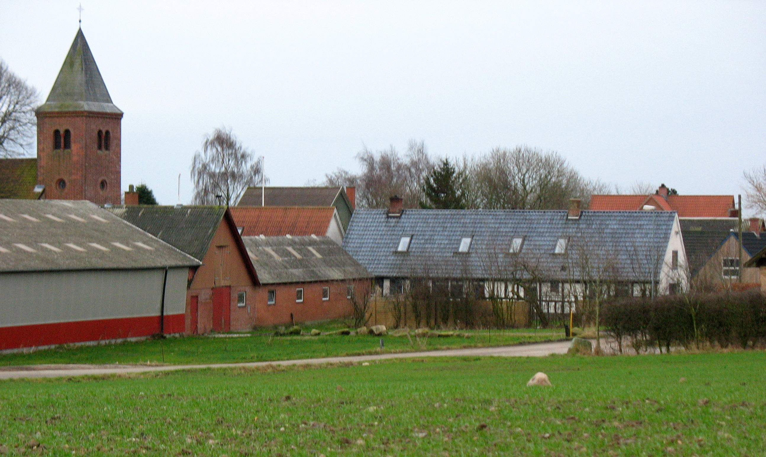 Den lille by Ølsted i Østjylland. Til venstre Ølsted Kirke i Vester Lisbjerg Herred, Ølsted Sogn.